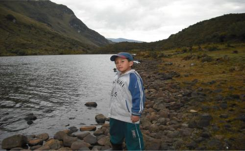 laguna turistica de las quinuas en uchucmarca